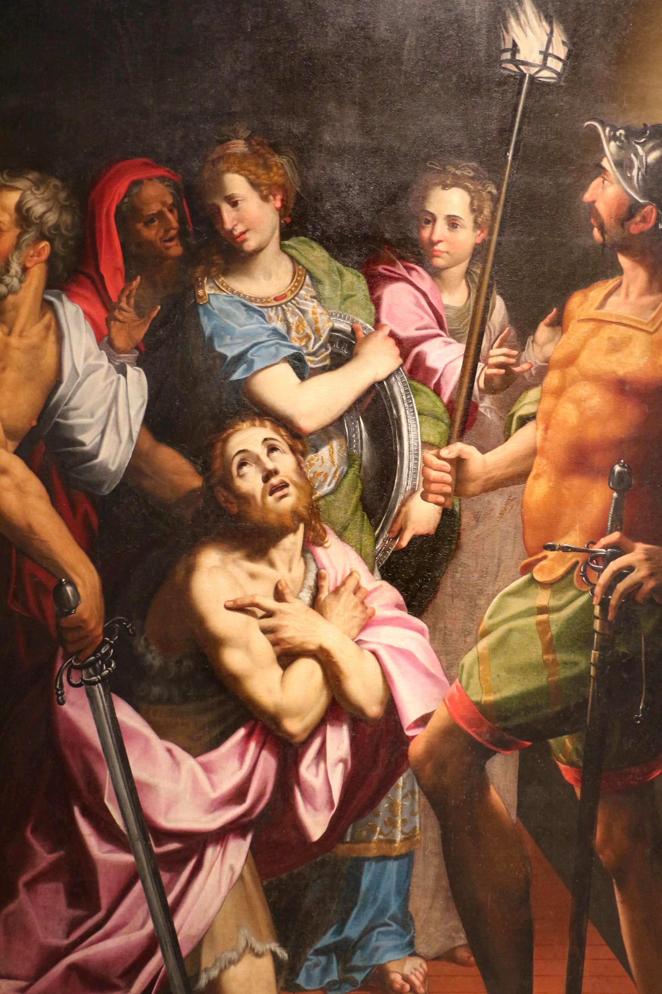 decollazione del battistatitle QS:P1476,it:"decollazione del battista" label QS:Lit,"decollazione del battista"